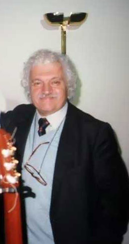 Bruno Lauzi, durante un concerto a Guardamiglio (LO)